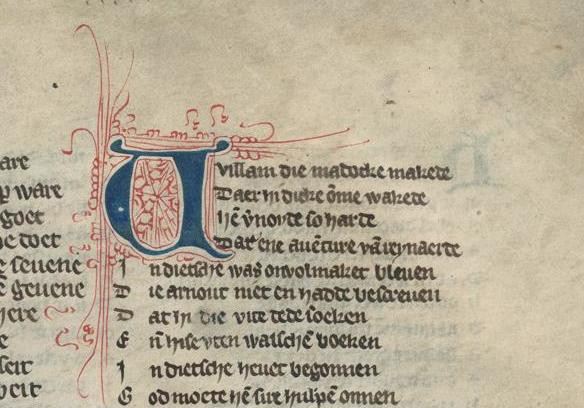 Dyckse manuscript 102 recto (Van den Vos Reynaerde - Willem die Madocke maecte) Münster NR 381